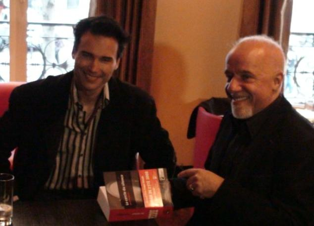 Paulo Coelho & David Hepburn - Remise grand prix Femme Actuelle Roman de l'été 2008